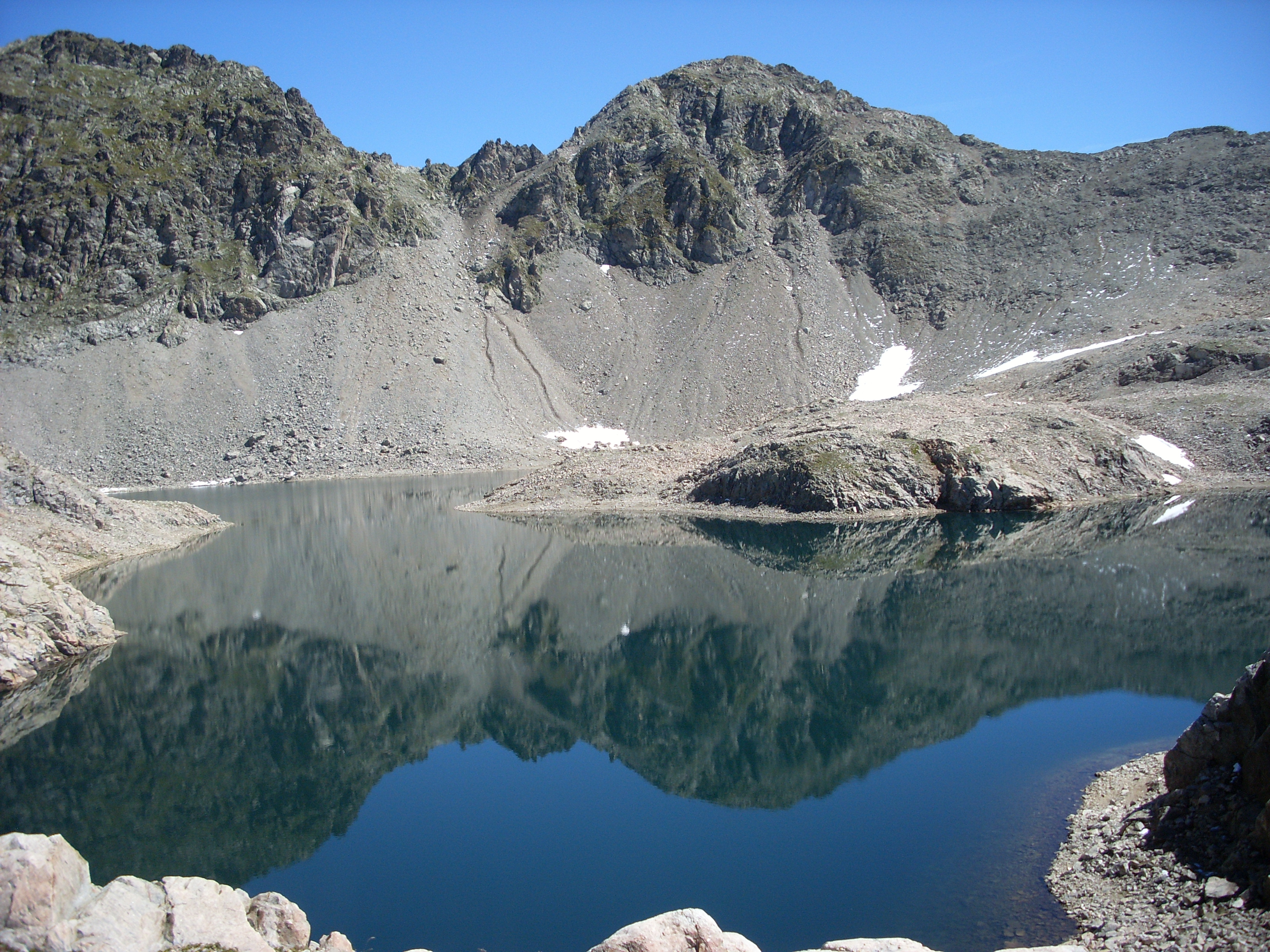 lac inférieur de crupillouse, été 2010.